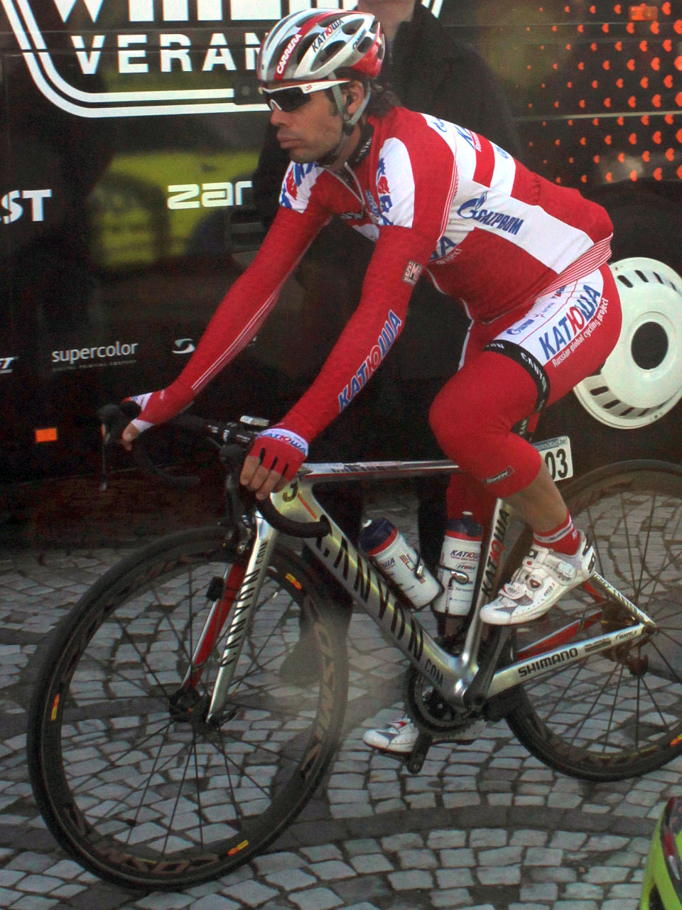 Oscar Freire